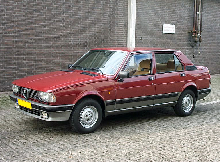 Alfa Romeo Giulietta 1.8 1984